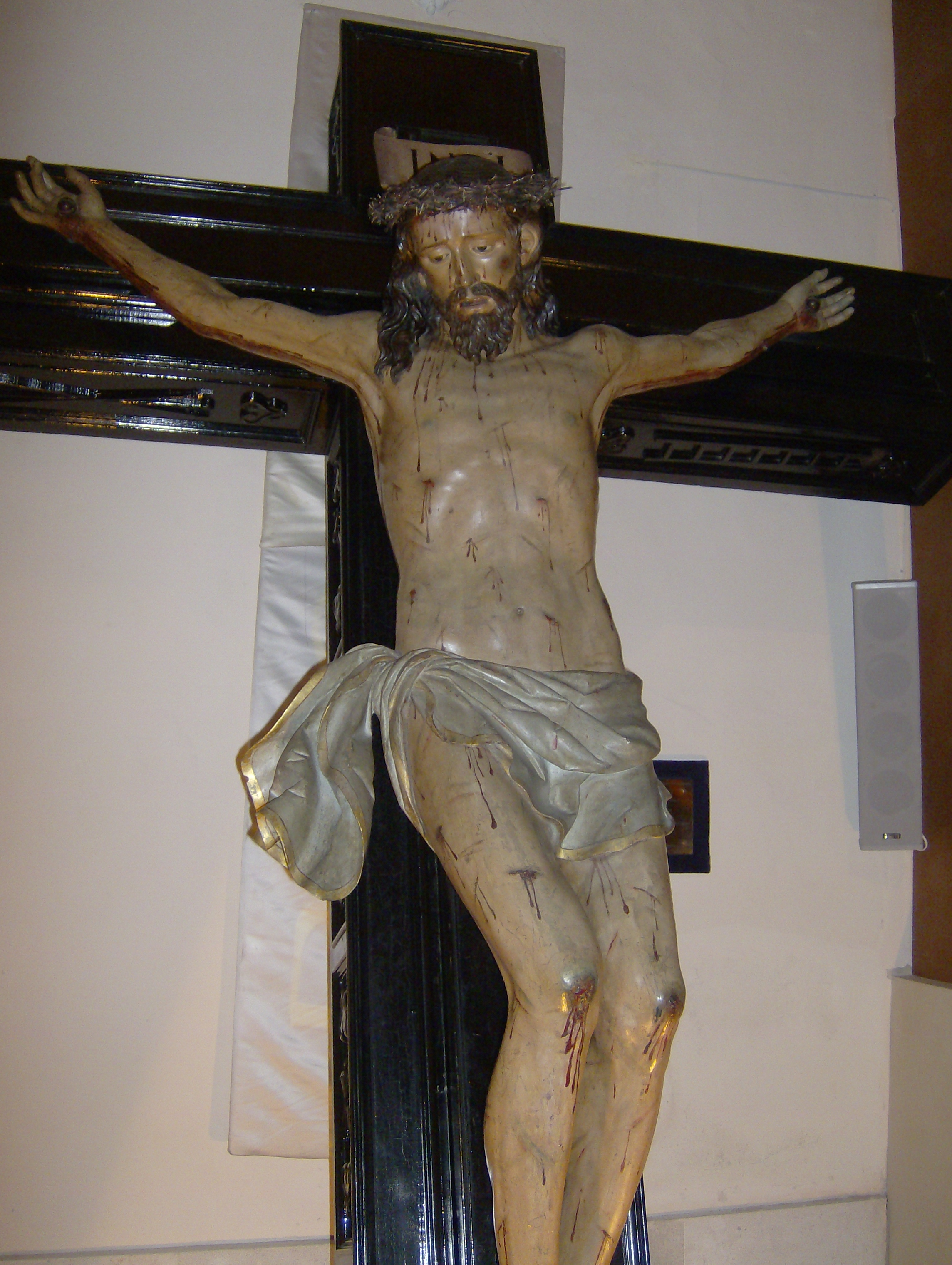 Nto. Padre Jesús Nazareno (Juan Antonio de la Peña), en su Iglesia Penitencial